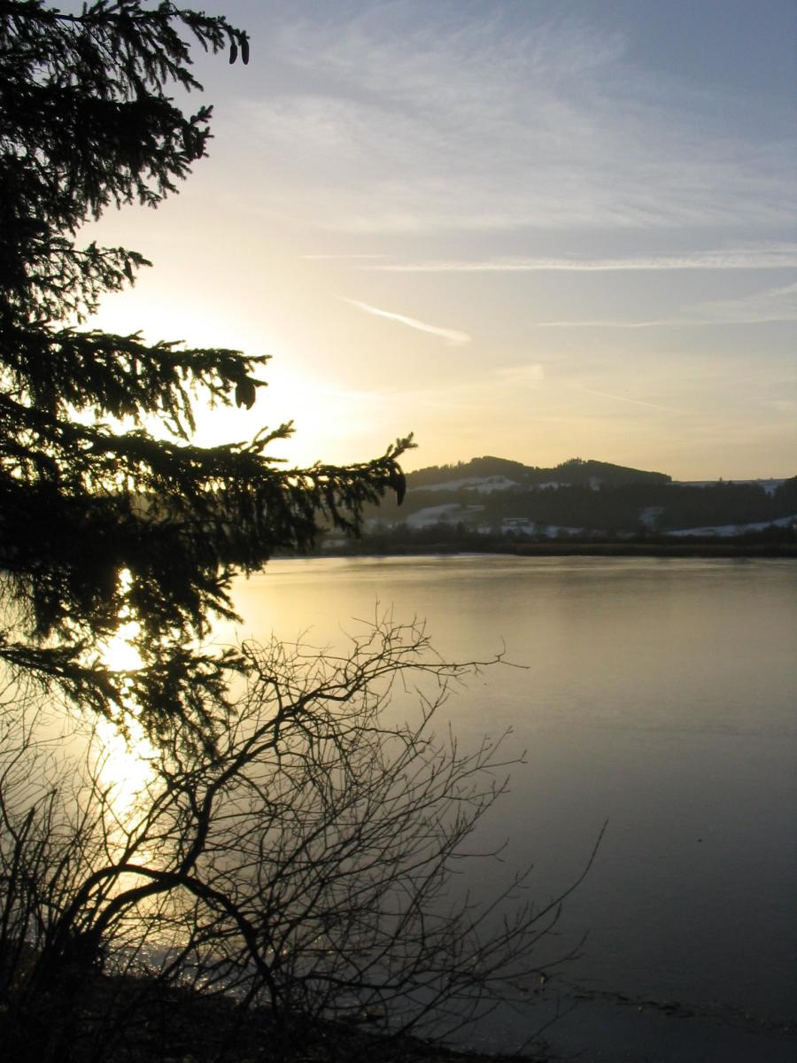 Auerberg und Haslacher See